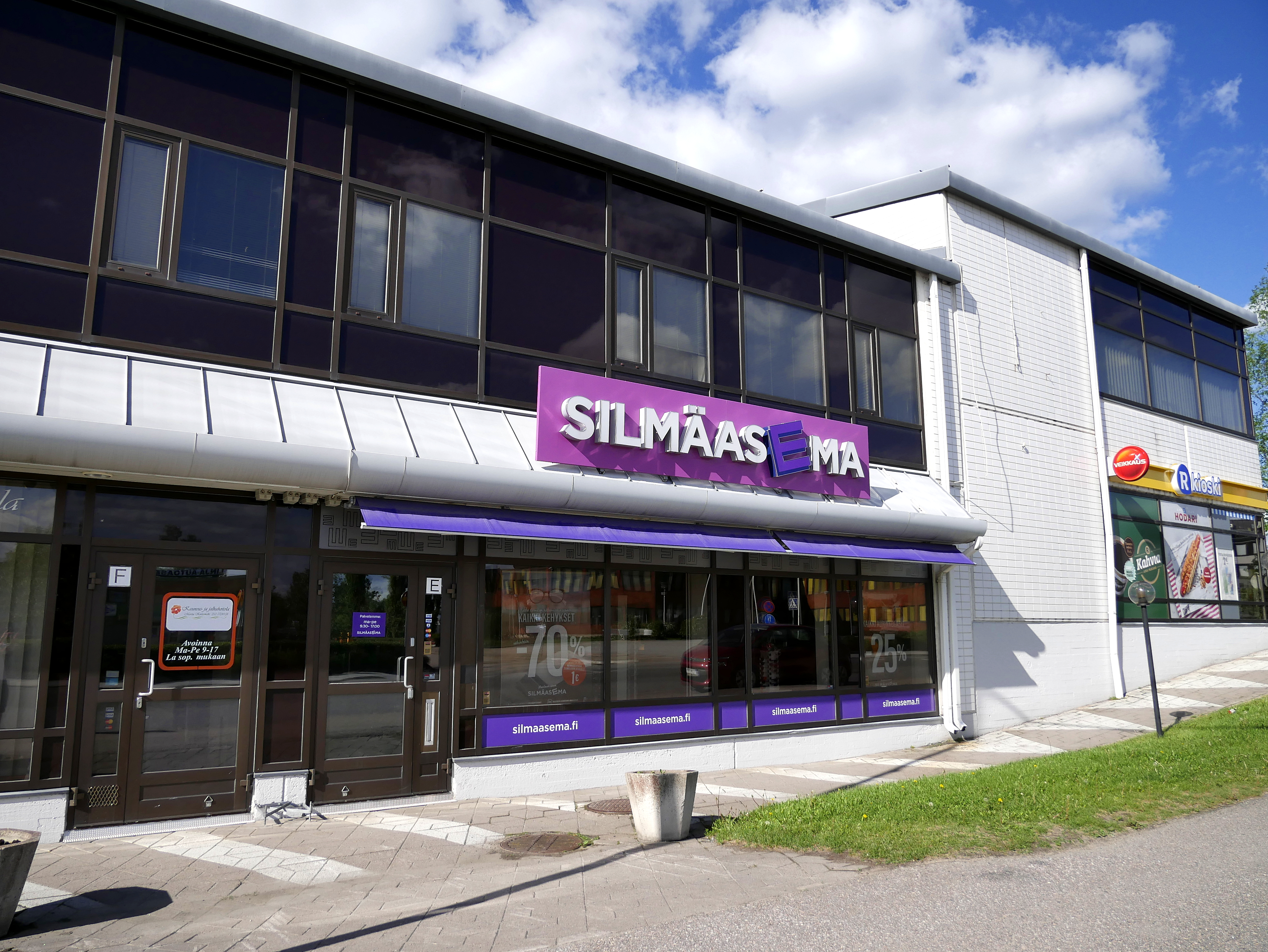 Alavuden Silmäasema.